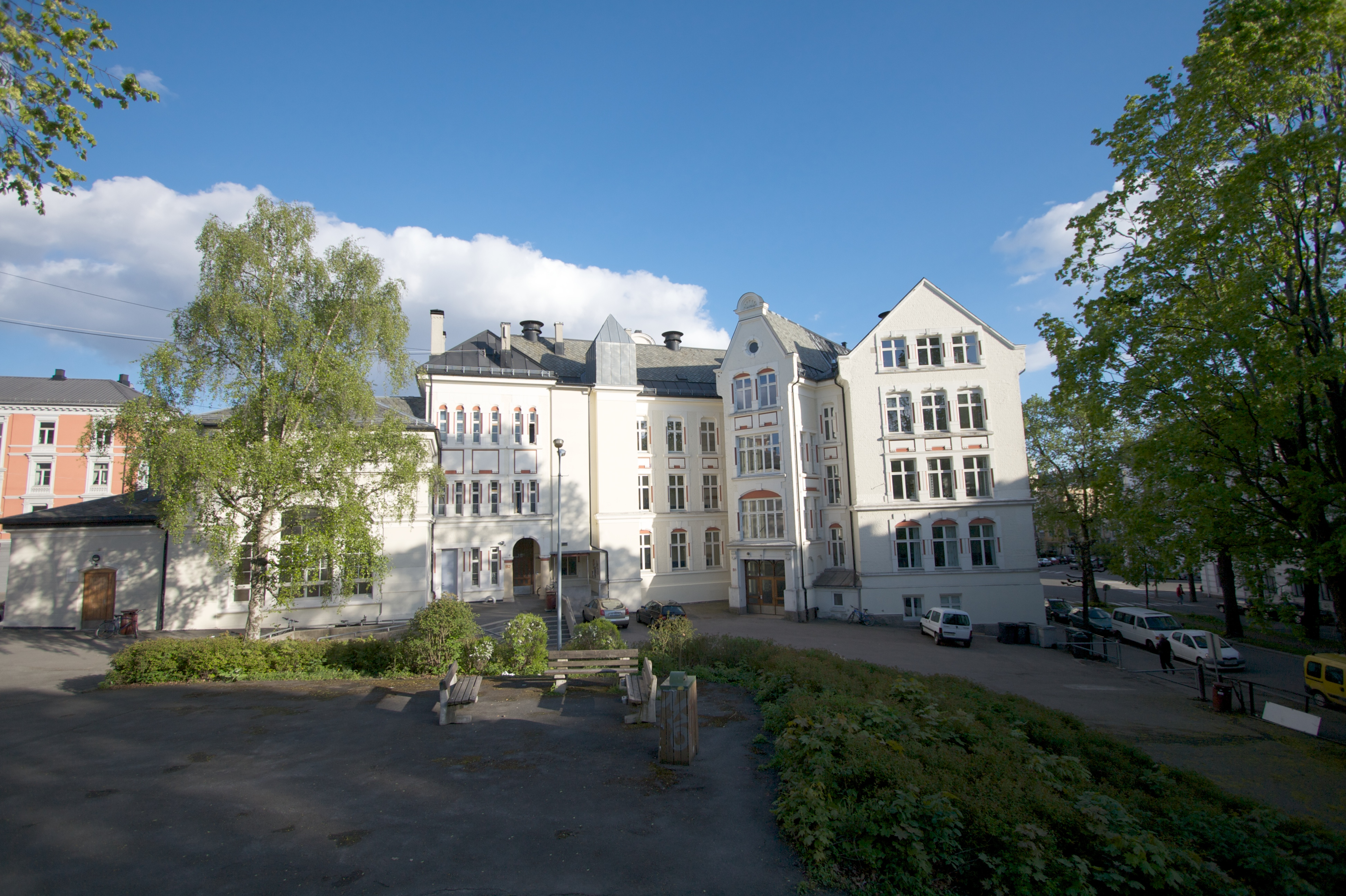 Den gamle Frogner skole i Niels Juels gate 52 i Oslo, nå i bruk av Hartvig Nissens skole.